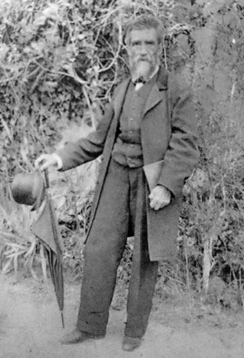 El pintor ecuatoriano Joaquín Pinto